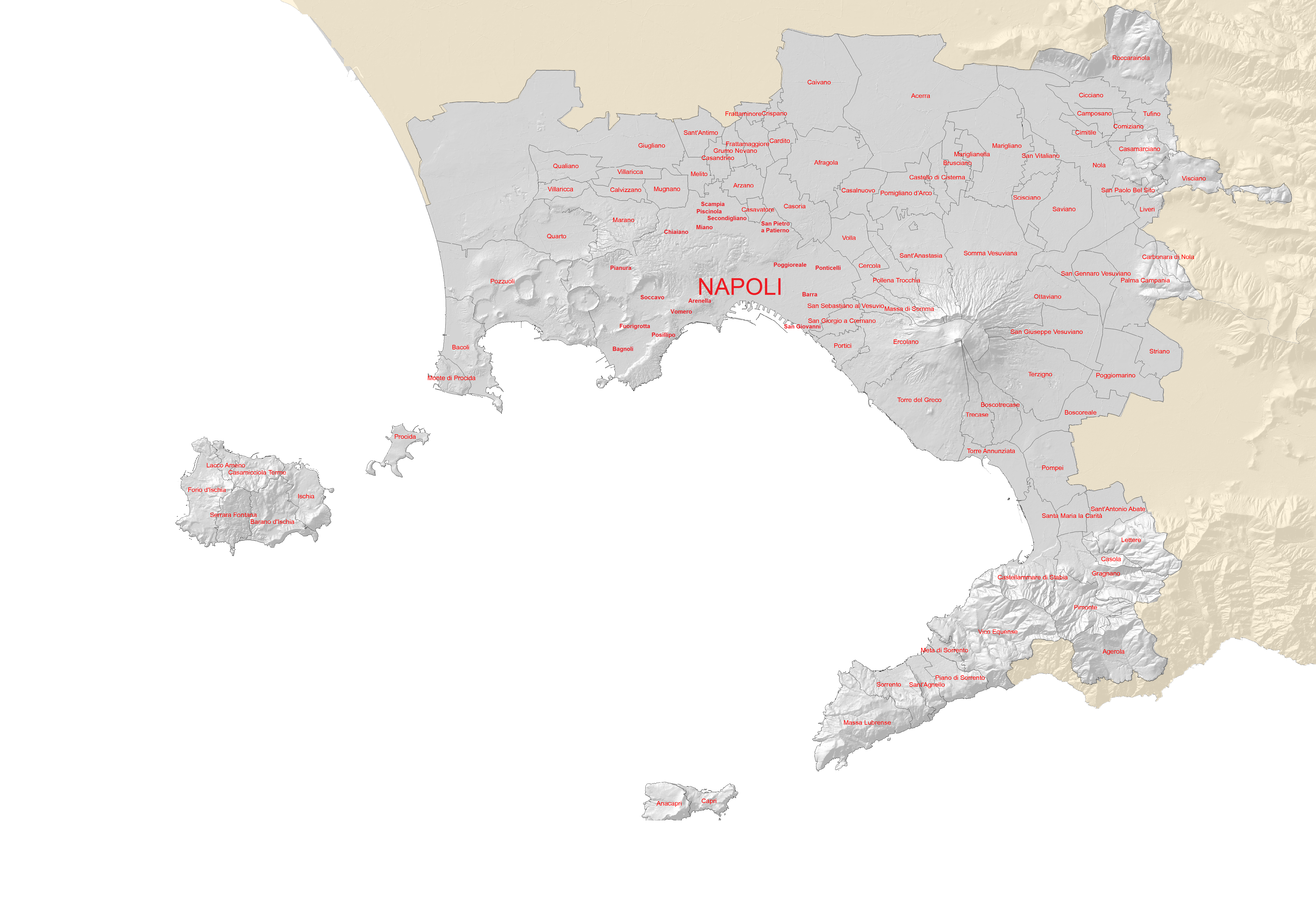 Napoli e hinterland